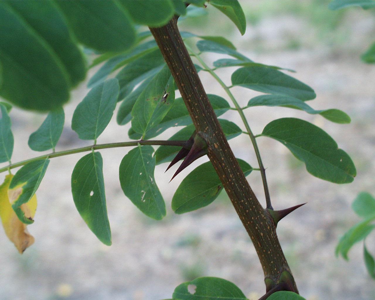 Les feuilles de Robinier faux-Acacia (Robinia pseudoacacia)sont pennées et les stipules transformées en épines.